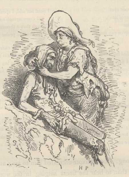 "Um Cabreiro trata a orelha de Dom Quixote" (1863), iIustração por Gustave Doré para “Don Quixote“ de Miguel de Cervantes.